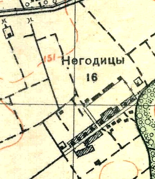 Топографическая карта Ленинградской области, квадрат О-35-23-А-г (Черенковицы), деревня Негодицы